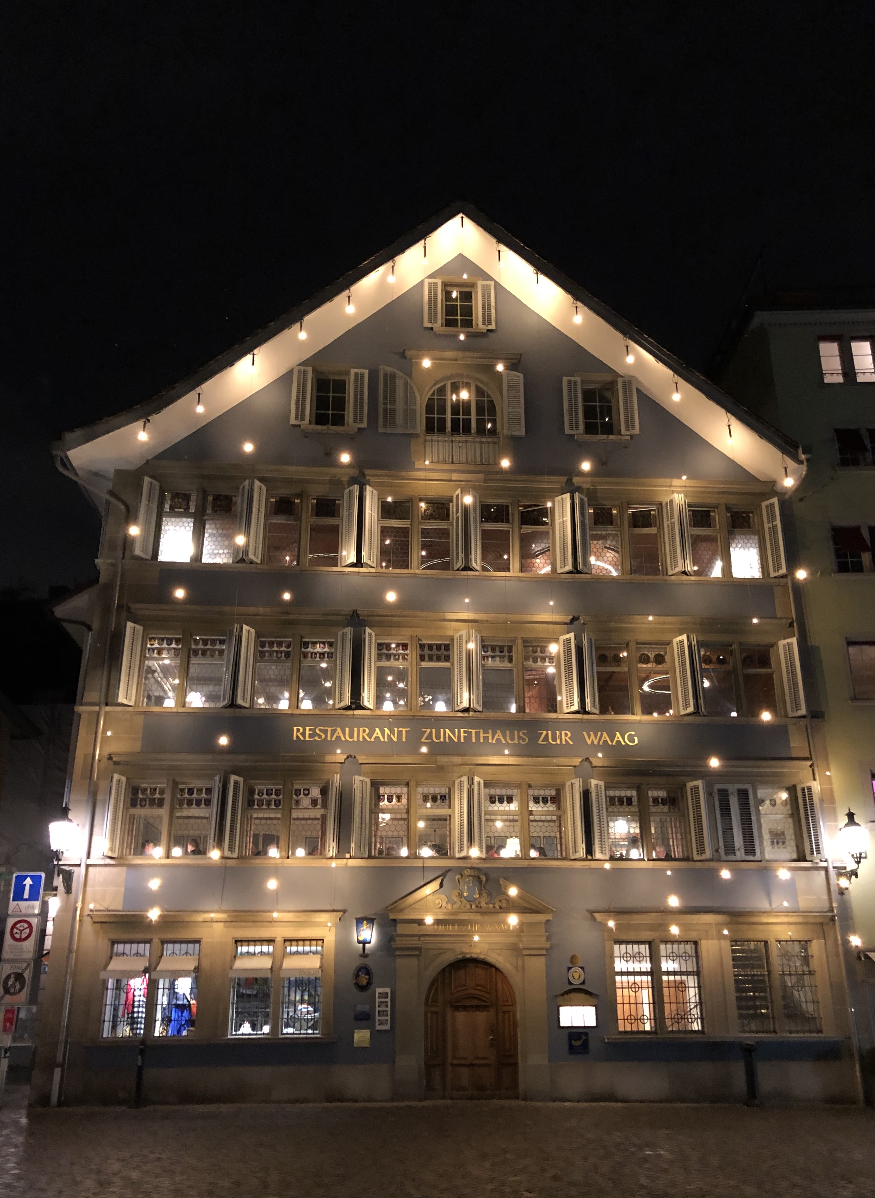 Das Zunfthaus zur Waag am Münsterplatz in Zürich, Dezember 2018